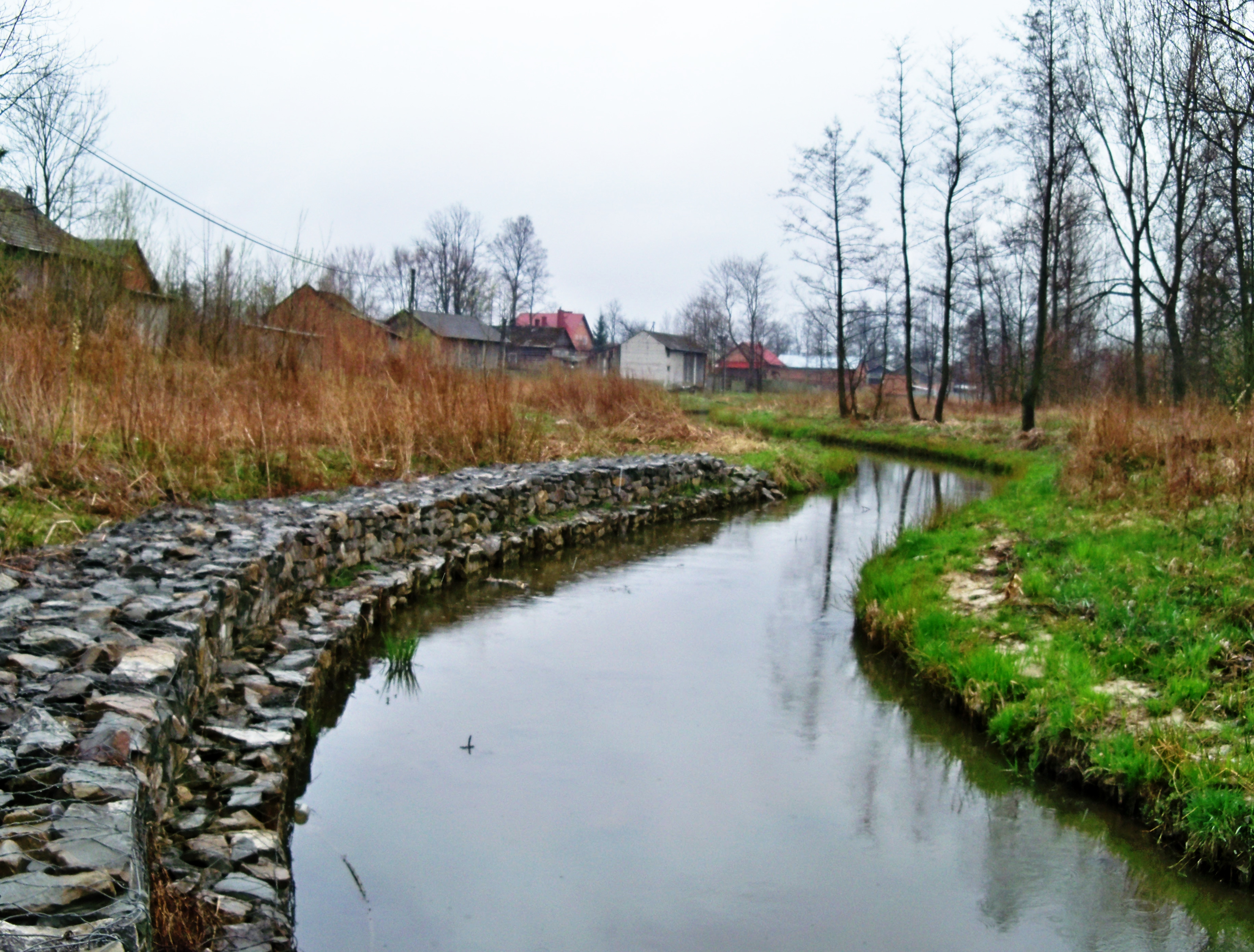 Trzebośnica na granicy między Trzebosią (po lewej) a Kątami Trzebuskimi (po prawej) z gabionem w miejscu erozji bocznej